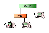 HUB_SWITCH_5